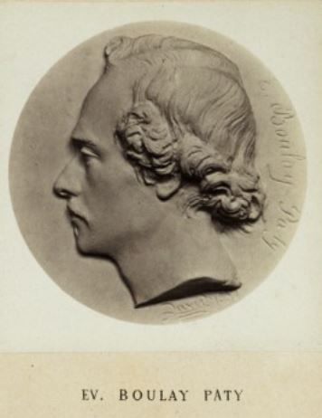 Évariste Boulay-Paty (1804-1864), médaillon par David d'Angers in Les médaillons de David d'Angers (1788-1856) réunis et publiés par son fils David d'Angers, Robert (1833-1912). 1867 (BNF, Gallica)